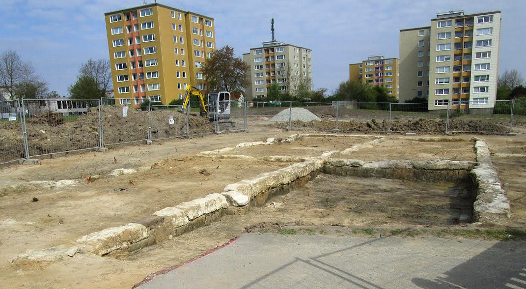 KZ-Außenlager Laagberg, freigelegte Fundamente der KZ-Baracke Block 4